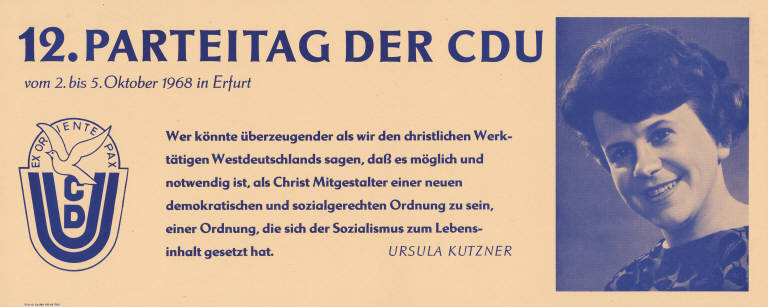 12. Parteitag der CDU ... Wer könnte überzeugender als wir den christlichen Werktätigen Westdeutschlands sagen, daß es möglich und notwendig ist, als Christ Mitgestalter einer neuen demokratischen und sozialgerechten Ordnung zu sein, einer Ordnung, die sich der Sozialismus zum Lebensinhalt gesetzt hat. Ursula KutznerAbbildung:Parteilogo - Porträtfoto Ursula KutznerPlakatart:Kandidaten-/Personenplakat mit PorträtDrucker_Druckart_Druckort:III-9-19 Ag 224-100-68 7265Objekt-Signatur:10-024 : 3075Bestand:Plakate aus der SBZ/DDR (10-024)GliederungBestand10-18:Ost-CDU / CDUD / Exil-CDULizenz:KAS/ACDP 10-024 : 3075 CC-BY-SA 3.0 DE